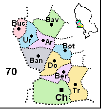 carte du canton de Châtenois-les-Forges (Territoire de Belfort)